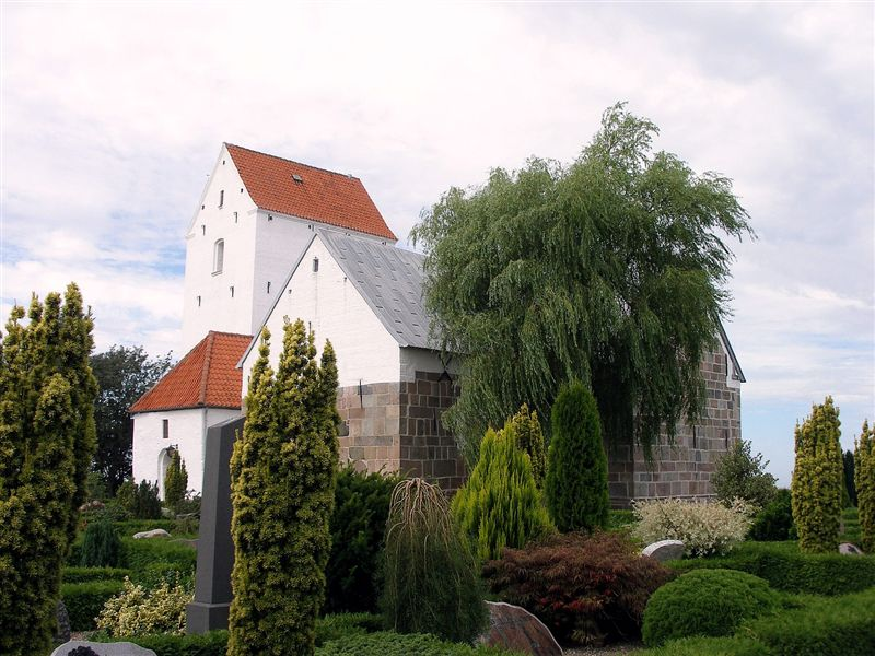 Balling Kirke, Skive Kommune